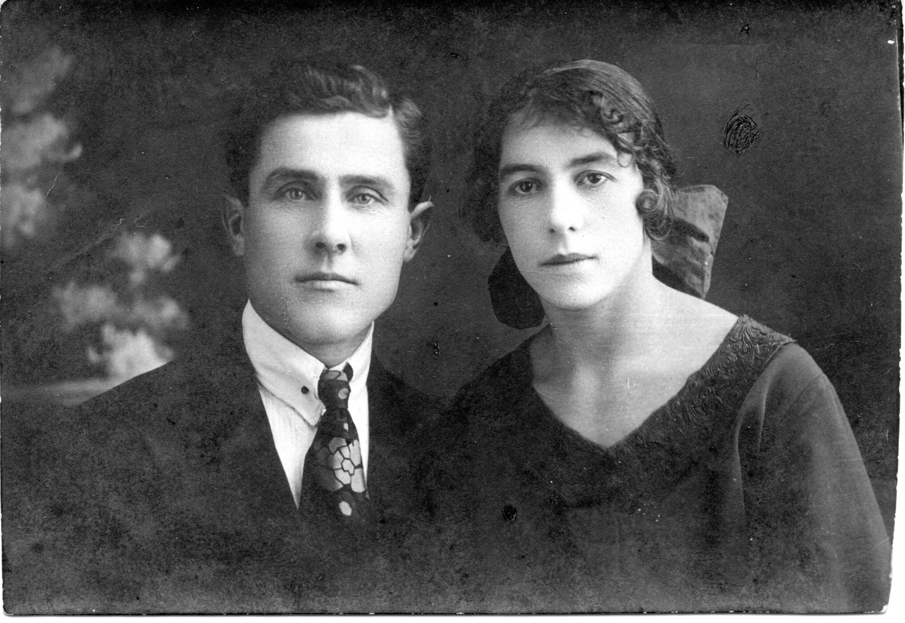 Andriy_&_Evgenia_Yankovsky_1927g.jpg: Андрій Мартинов з дружиною Євгенією Мартиновою (Янковською), 1927 рік